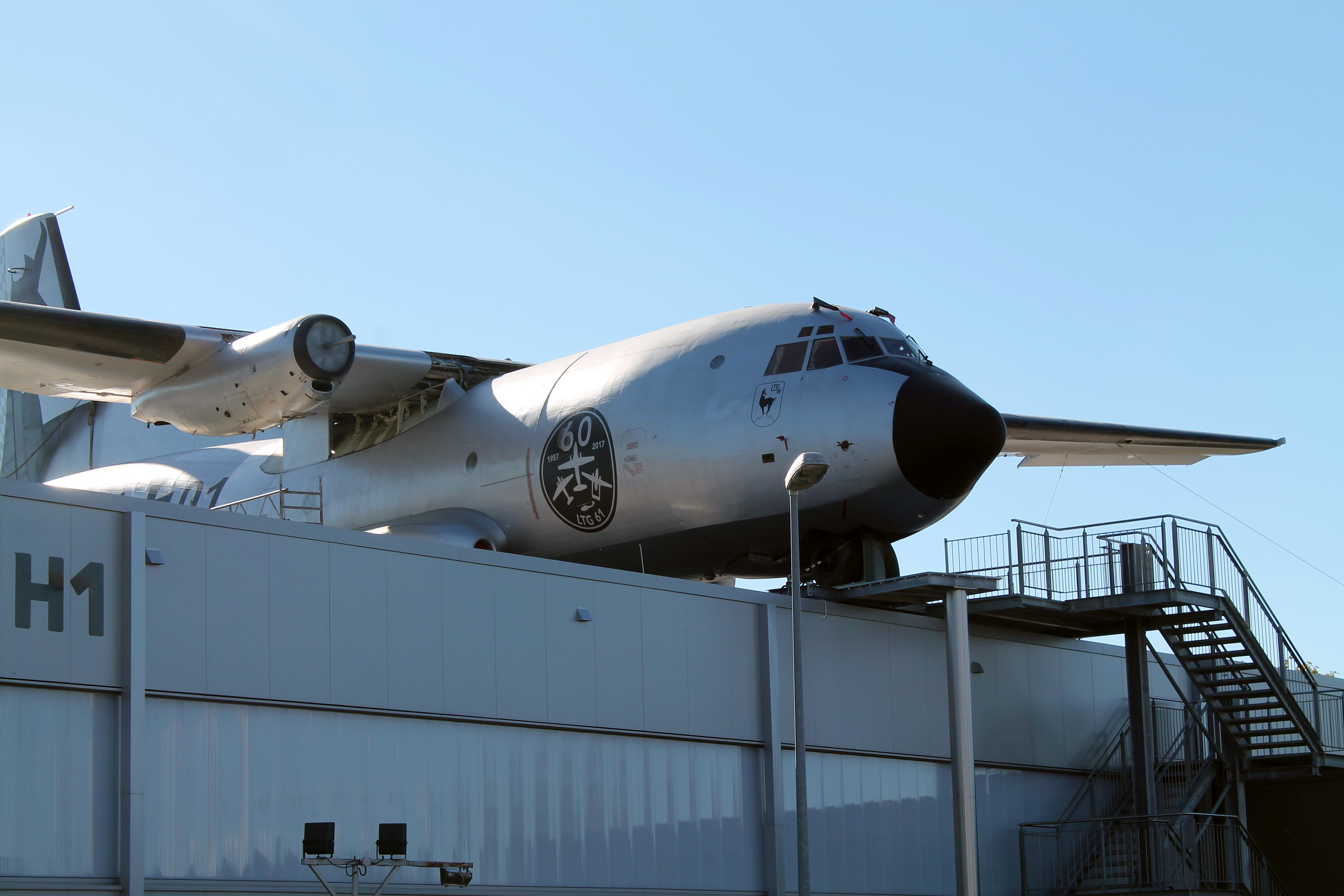 Die Transall C-160 51+01 auf dem Luftfahrtmuseum Wernigerode. Sachsen-Anhalt, Deutschland.